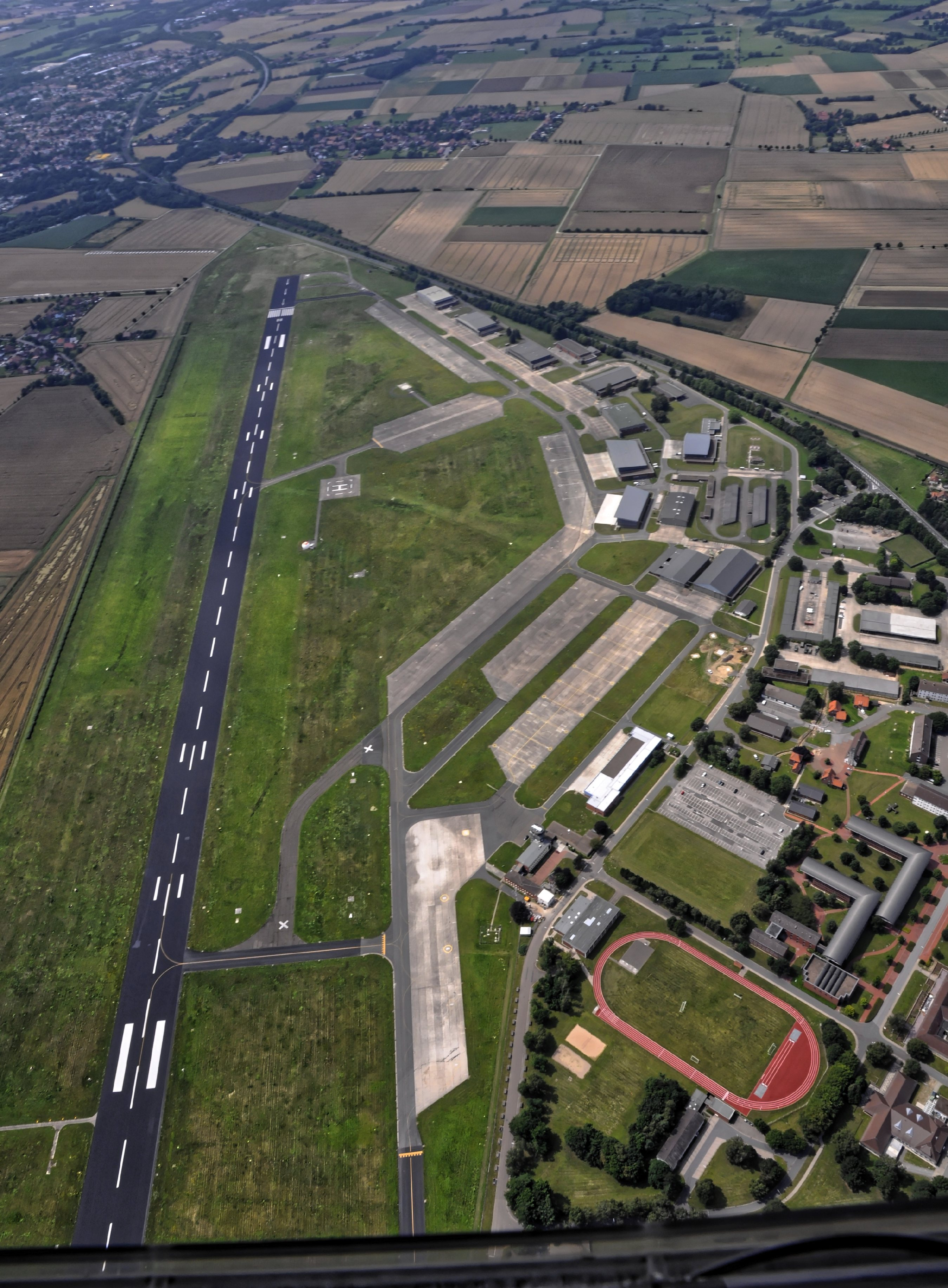 Bilder vom Flug Nordholz-Hammelburg 2015: Heeresflugplatz Bückeburg